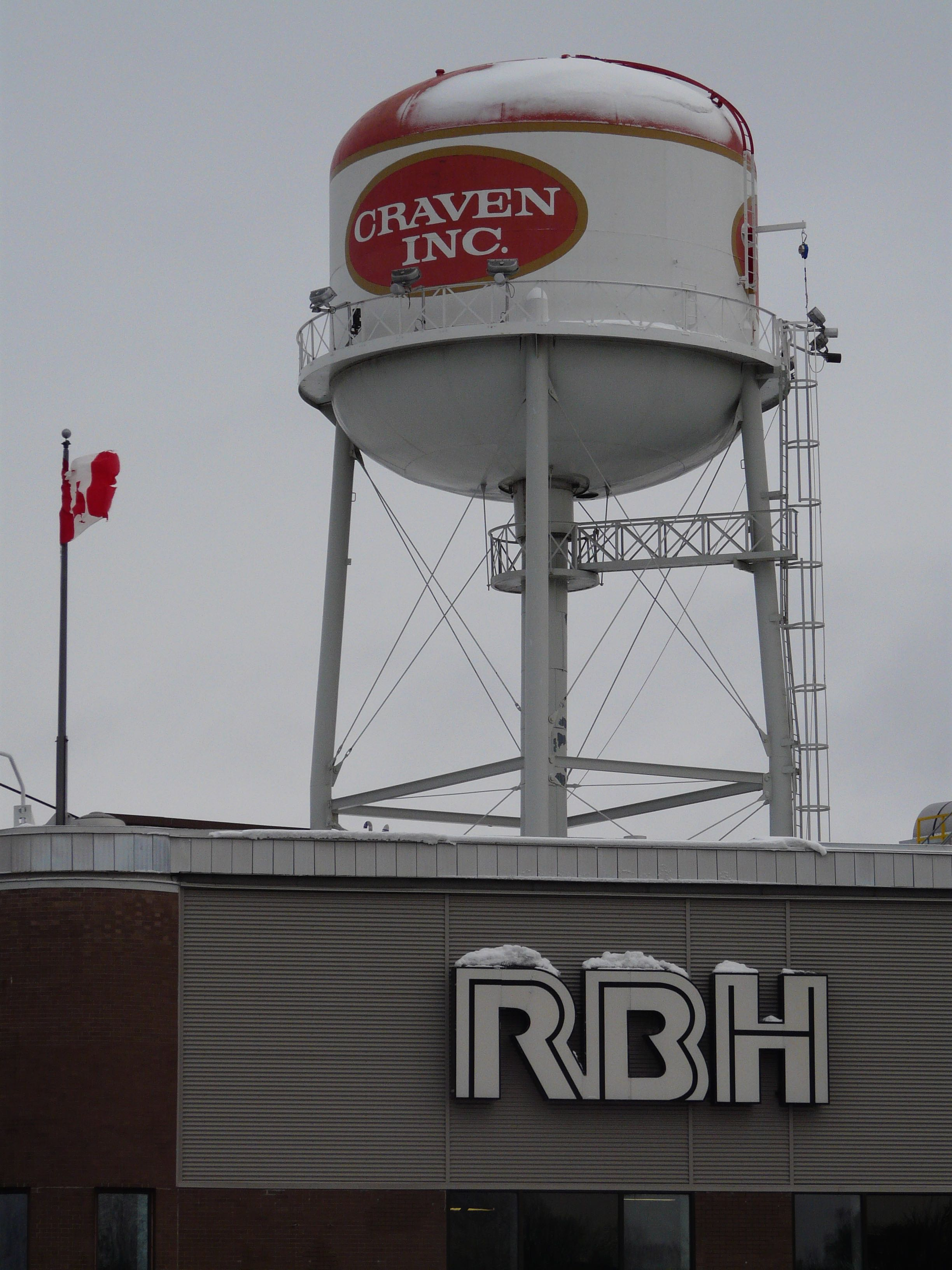 Rothmans, Benson & Hedges Headquarters in Quebec City, Canada